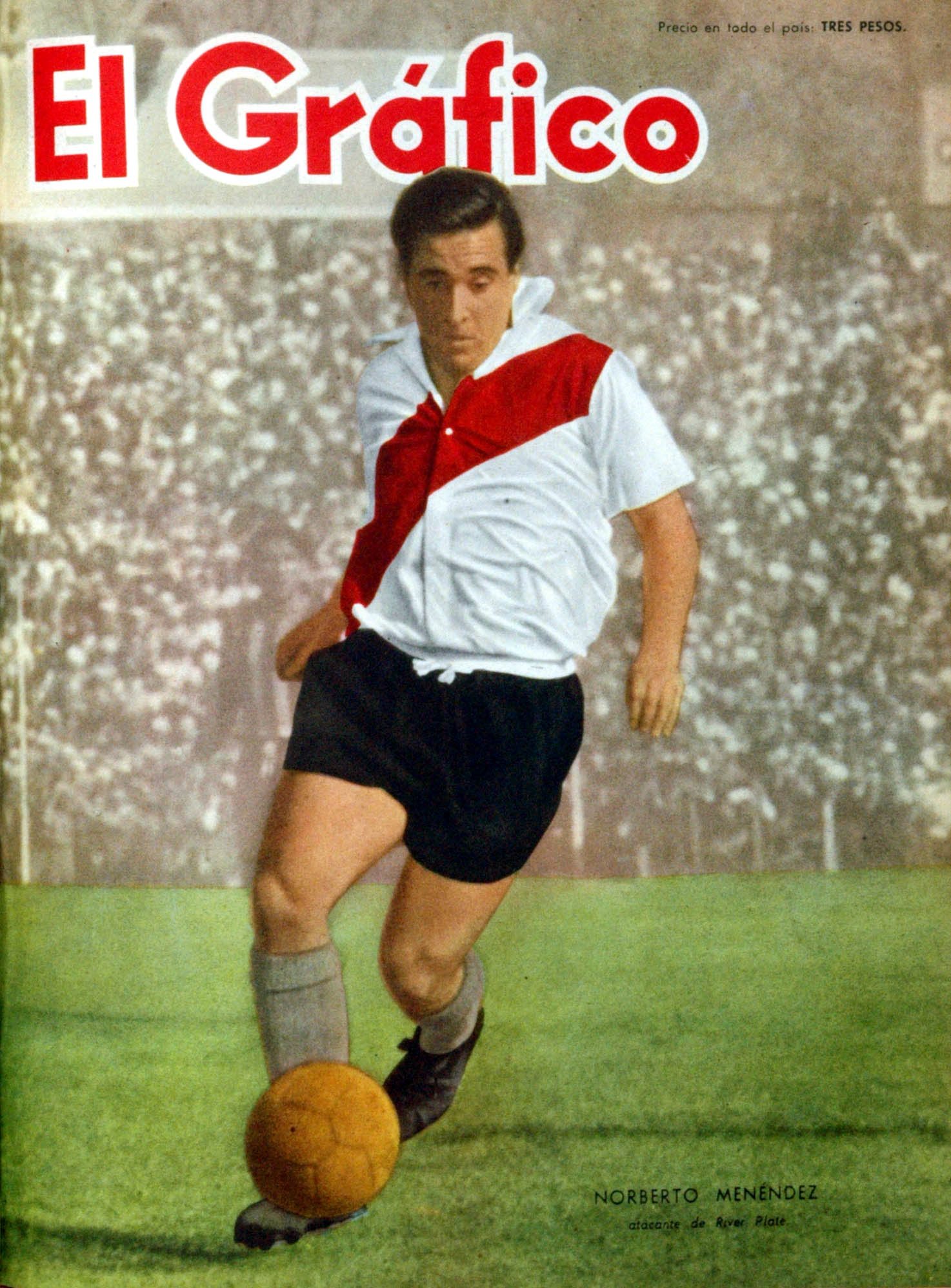 El Grafico del 10 de Mayo de 1957. Edicion 1965